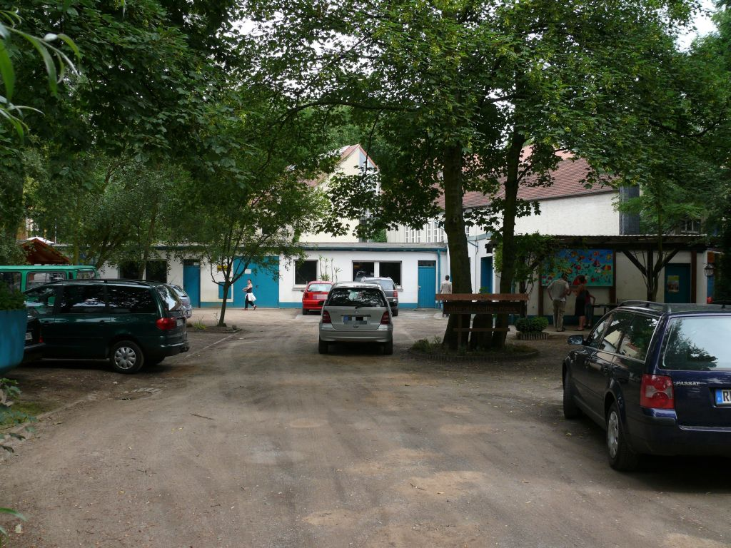 Sitz des Callo-Theaters.